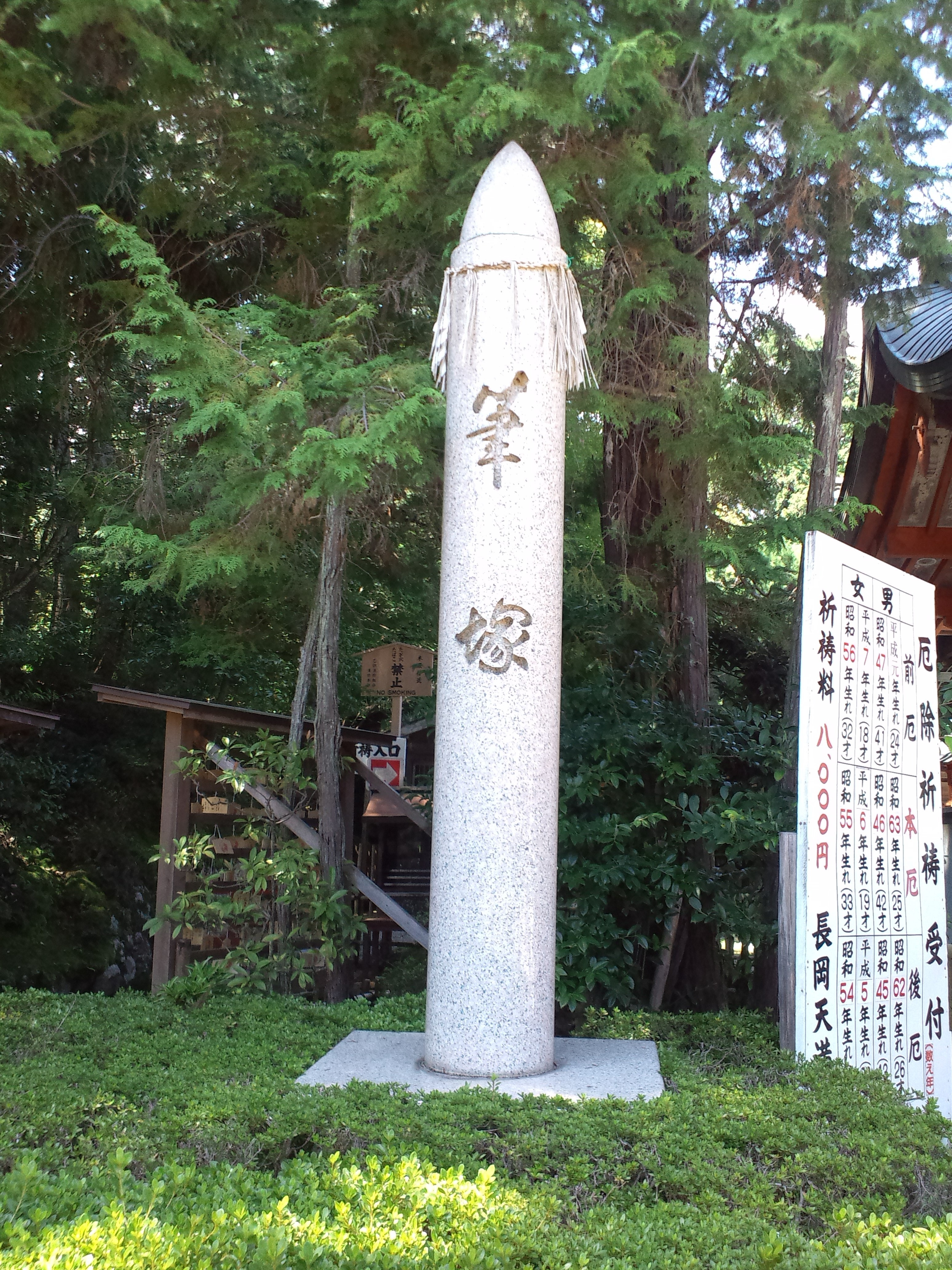 長岡天満宮 筆塚 入口